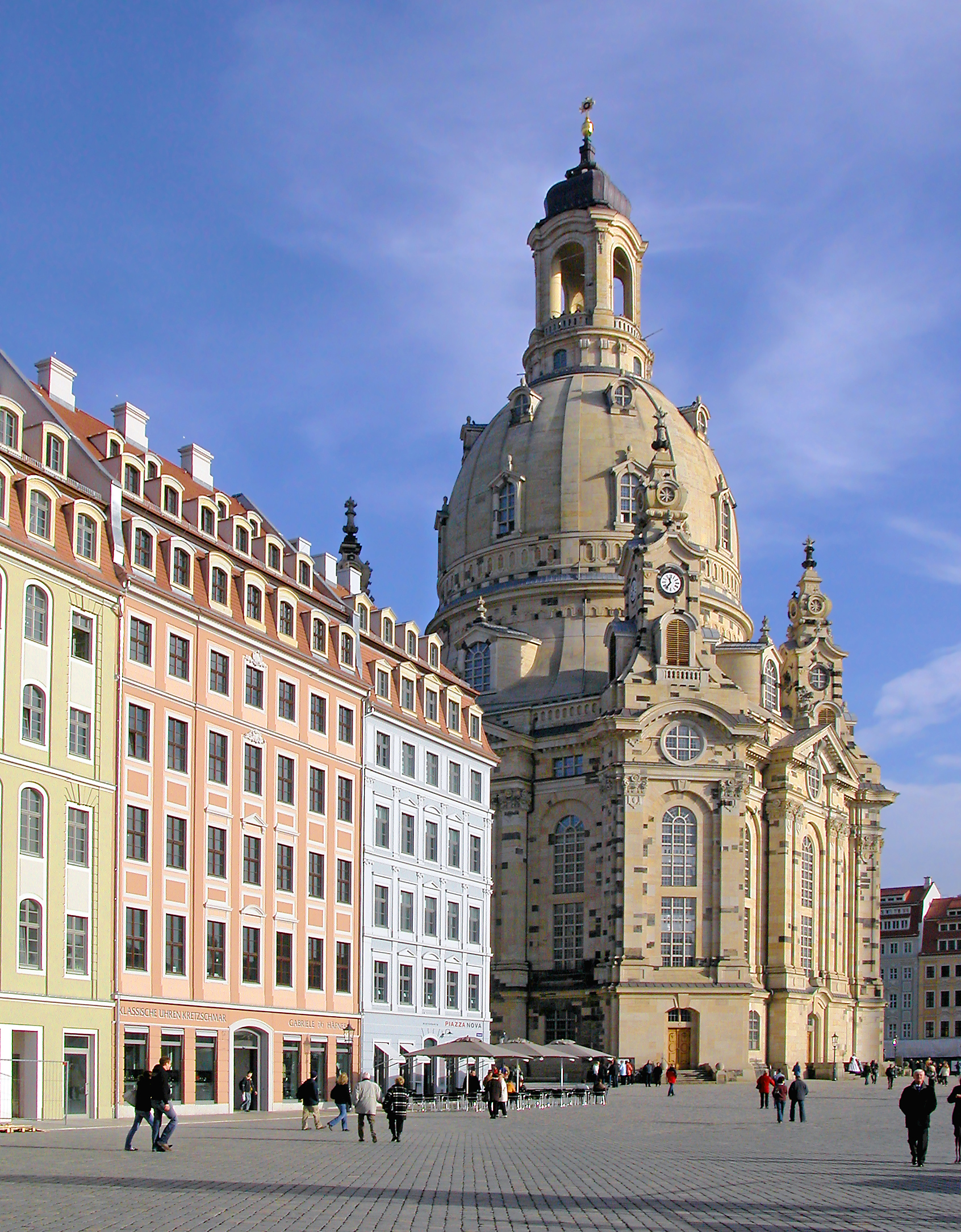 26.11.2006 01067 Dresden Neumarkt, v.l.n.r.: Neumarkt 1 (ehem. Hotel Stadt Berlin), Nr. 2 (ehem. Weigelsches Haus). Nr. 3 (ehem. Goldener Ring), Frauenkirche. [DSCN20181.TIF]20061126105DR.JPG(c)Blobelt